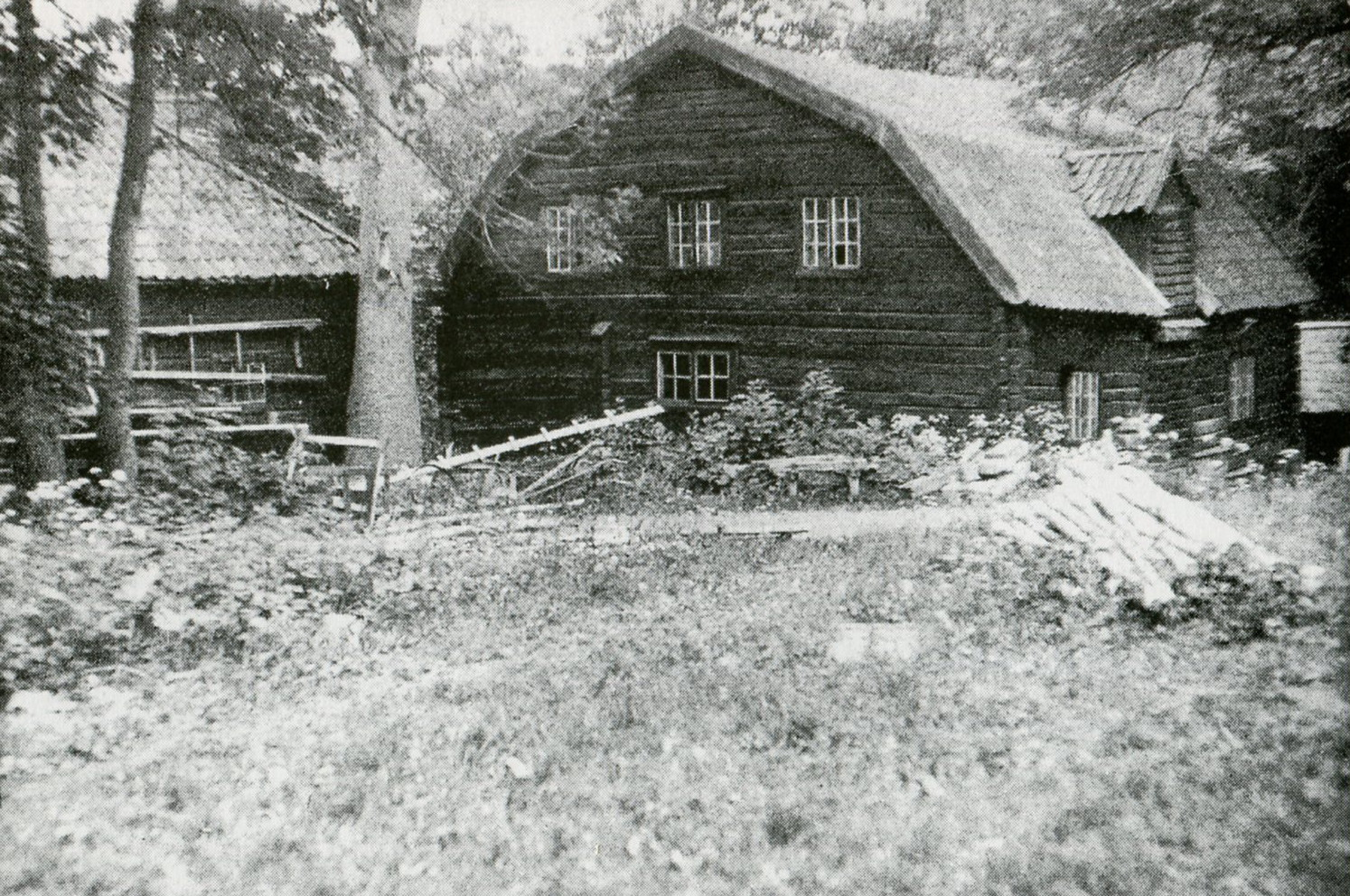 Vårby vattenkvarn omkring år 1900